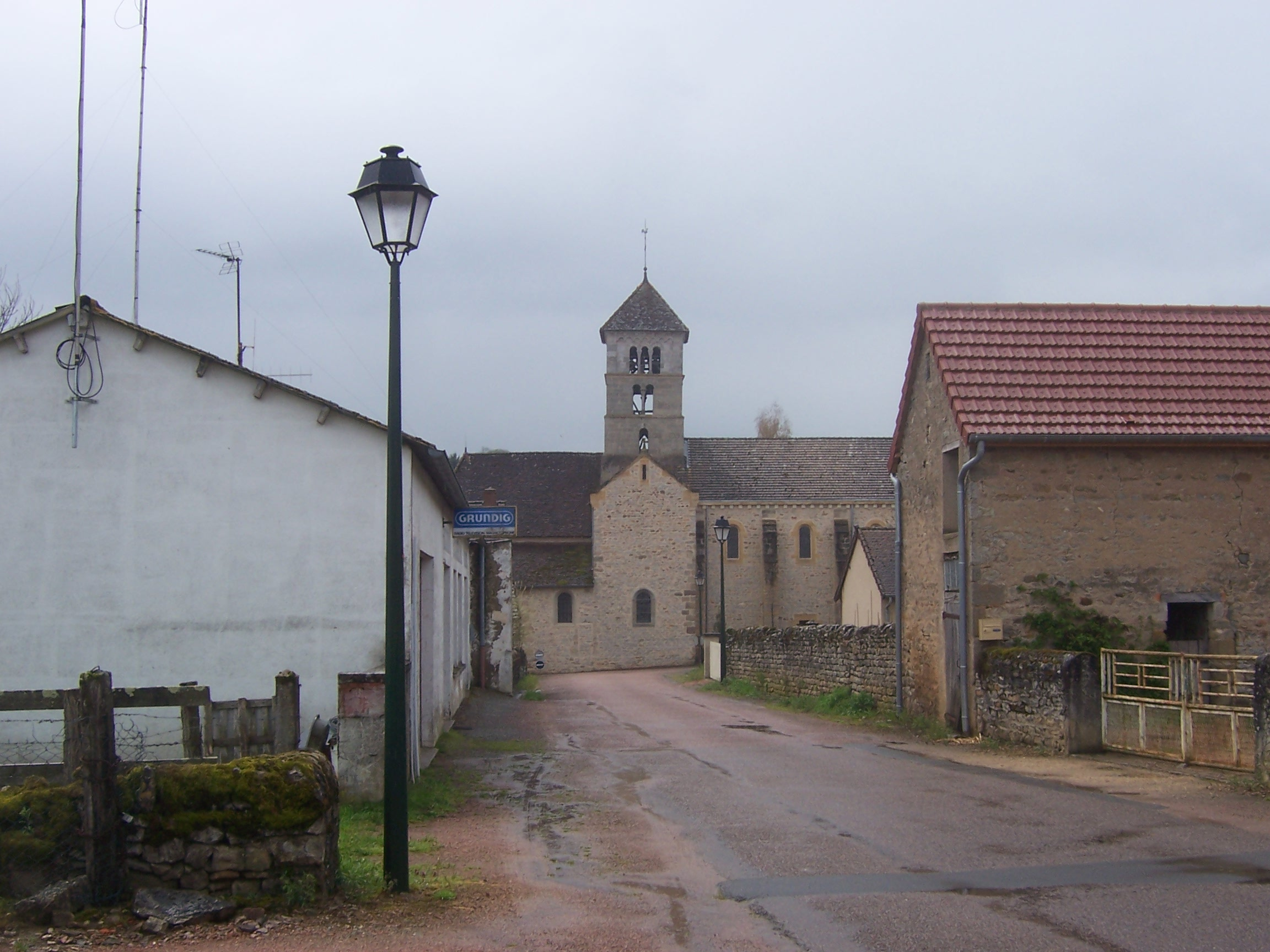 Eglise de Viry